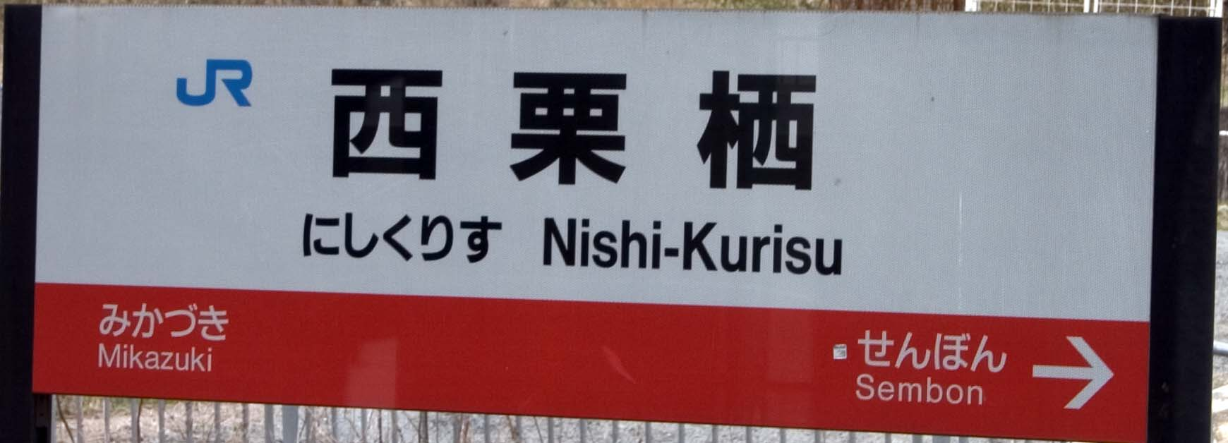 JR西日本西栗栖駅の名標